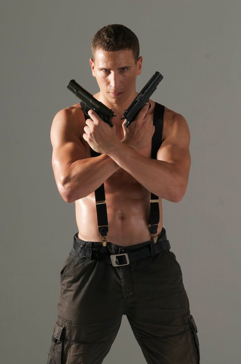 Séance Photo